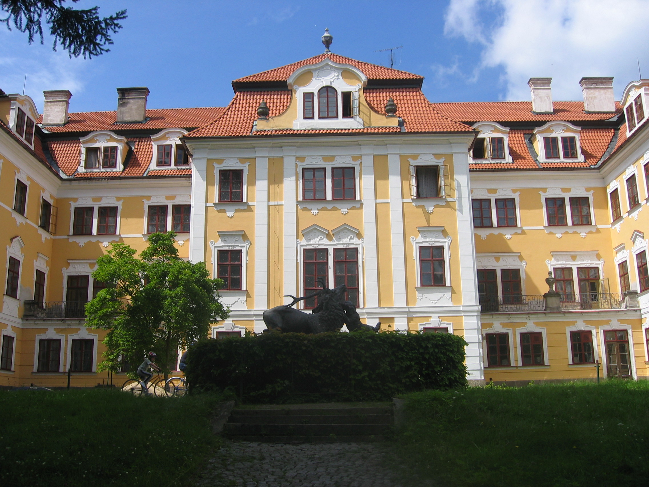 Průčelí barokního zámku v Chlumu u Třeboně (Jihočeský kraj, Česká republika)